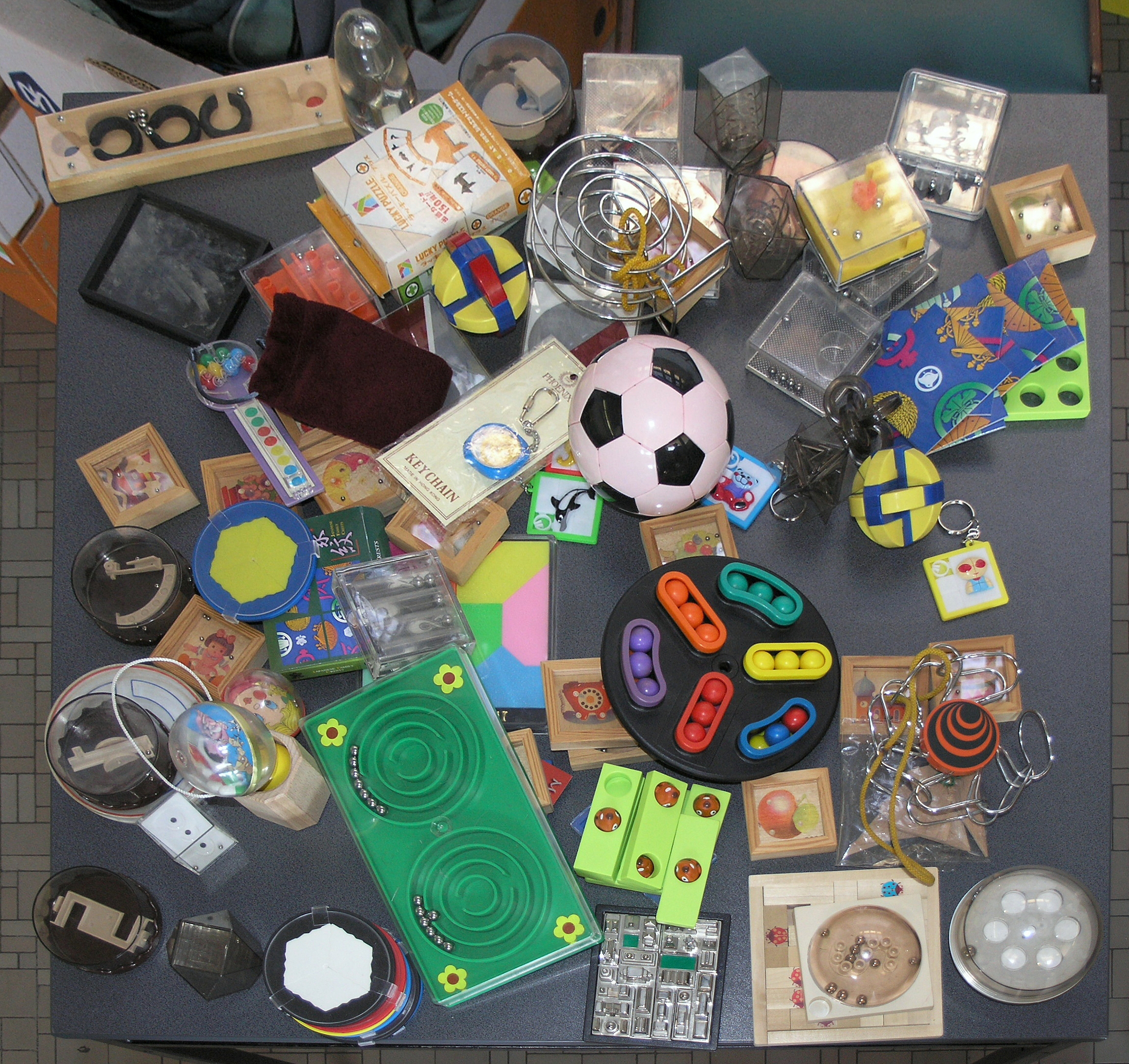 Hry a hlavolamy 2008 - festival her a hlavolamů v Praze, Holešovicích